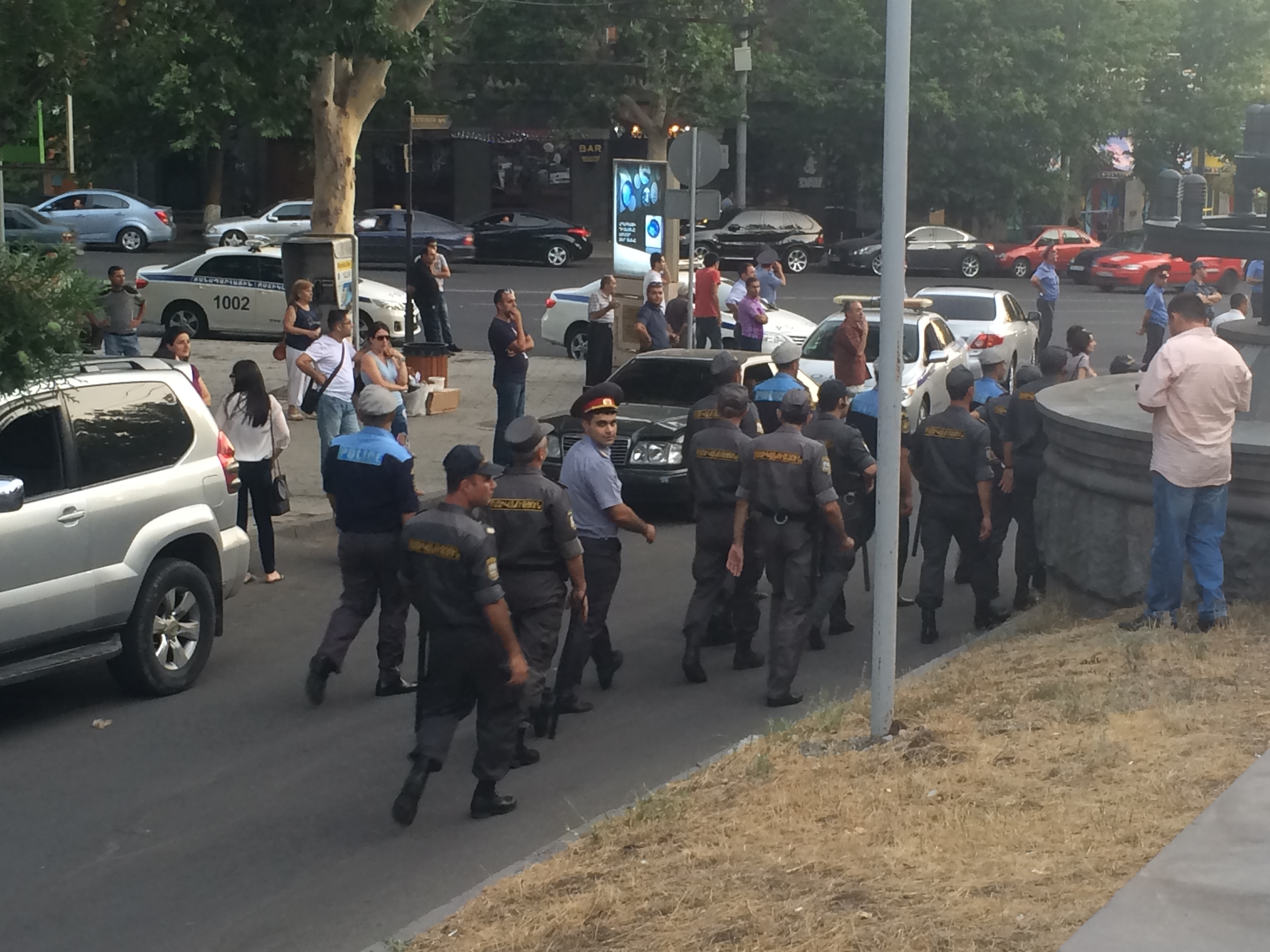 ՀՀ Ոստիկանությունը ցույցի ժամանակ, Երևան։